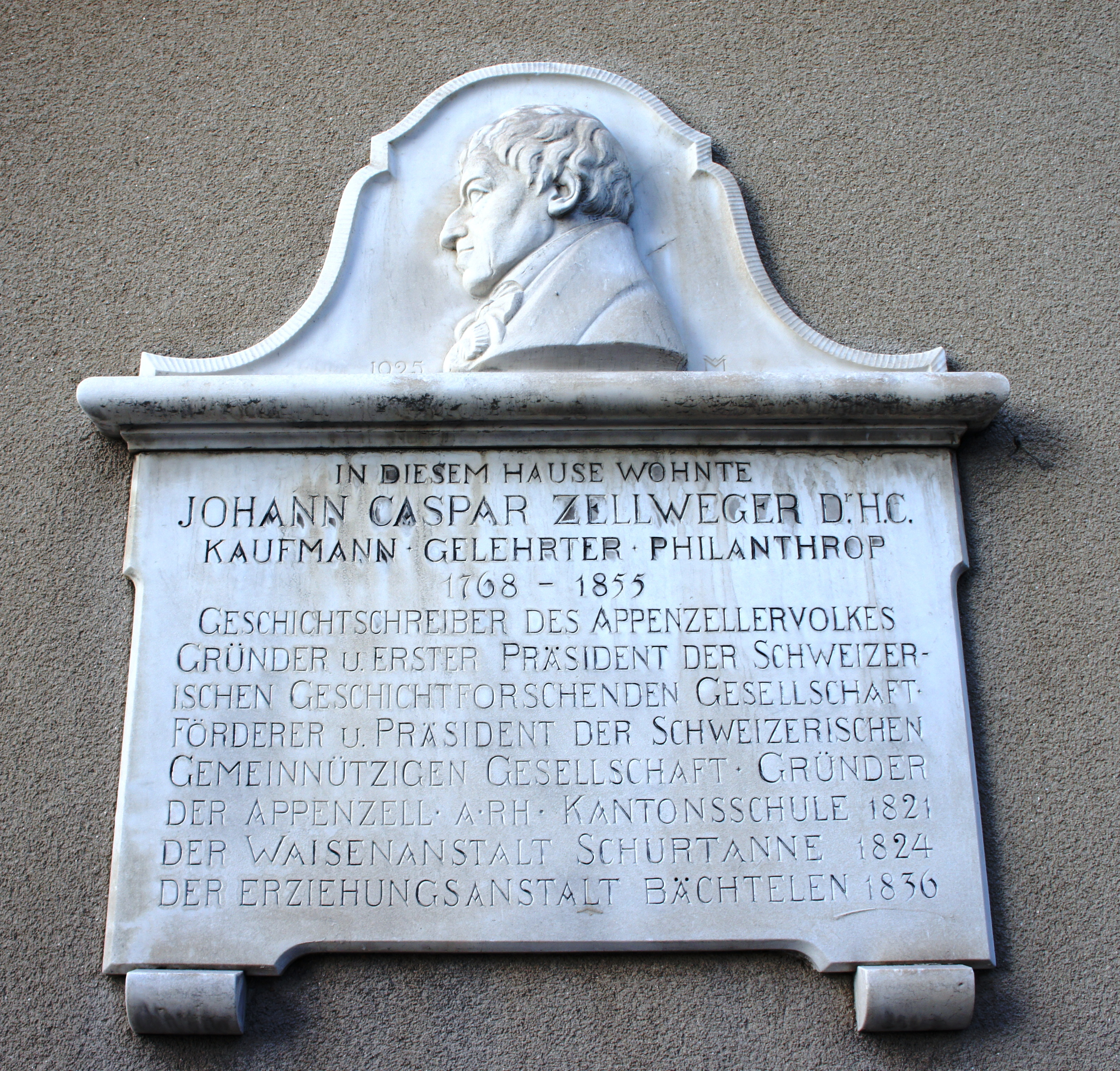 Blick auf die weisse Gedenktafel für JOHANN CASPAR ZELLWEGER an der Südwestfassade des Fünfeckpalastes am Landsgemeindeplatz 7 in Trogen. Über der Texttafel ist ein nach links blickendes Gesichtsprofil eines Mannes zu sehen. Darunter folgender Text: IN DIESEM HAUS WOHNTE / JOHANN CASPAR ZELLWEGER / KAUFNANN GELEHRTER PHILANTHROP / 1768 - 1855 / GESCHICHTSSCHREIBER DES APPENZELLER VOLKES / GRÜNDER u. ERSTER PRÄSIDENT DER SCHWEIZERISCHEN GESCHICHTFORSCHENDEN GESELLSCHAFT / FÖRDERER u. PRÄSIDENT DER SCHWEIZERISCHEN GEMEINNÜTZIGEN GESELLSCHAFT / GRÜNDER DER APPENZELL A RH KANTONSSCHULE 1821 / DER WAISENANSTALT SCHURTANNE 1824 / DER ERZIEHUNGSANSTALT BÄCHTELEN 1836